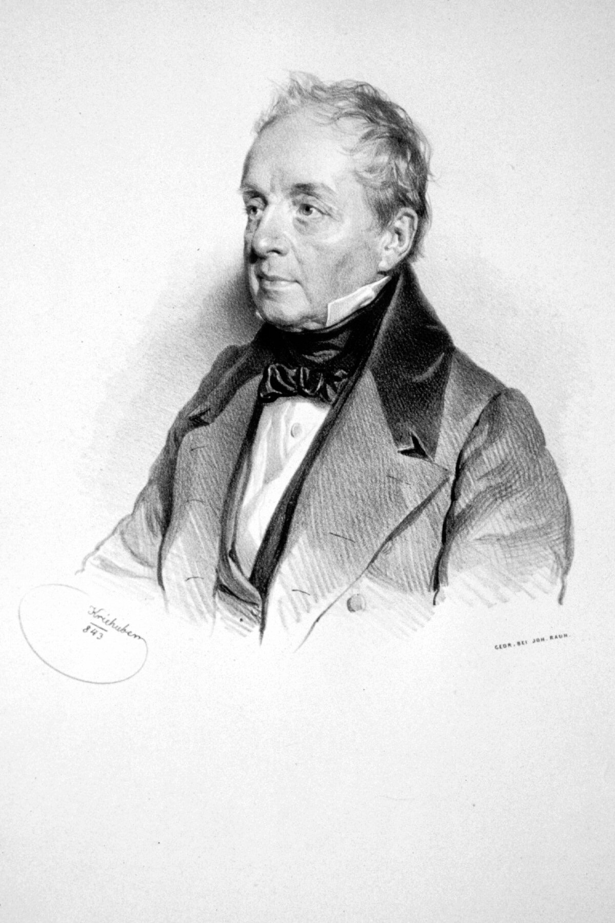 Leopold Welzl von Wellenheim (1773-1848), k. k. Hofrat, Numismatiker.